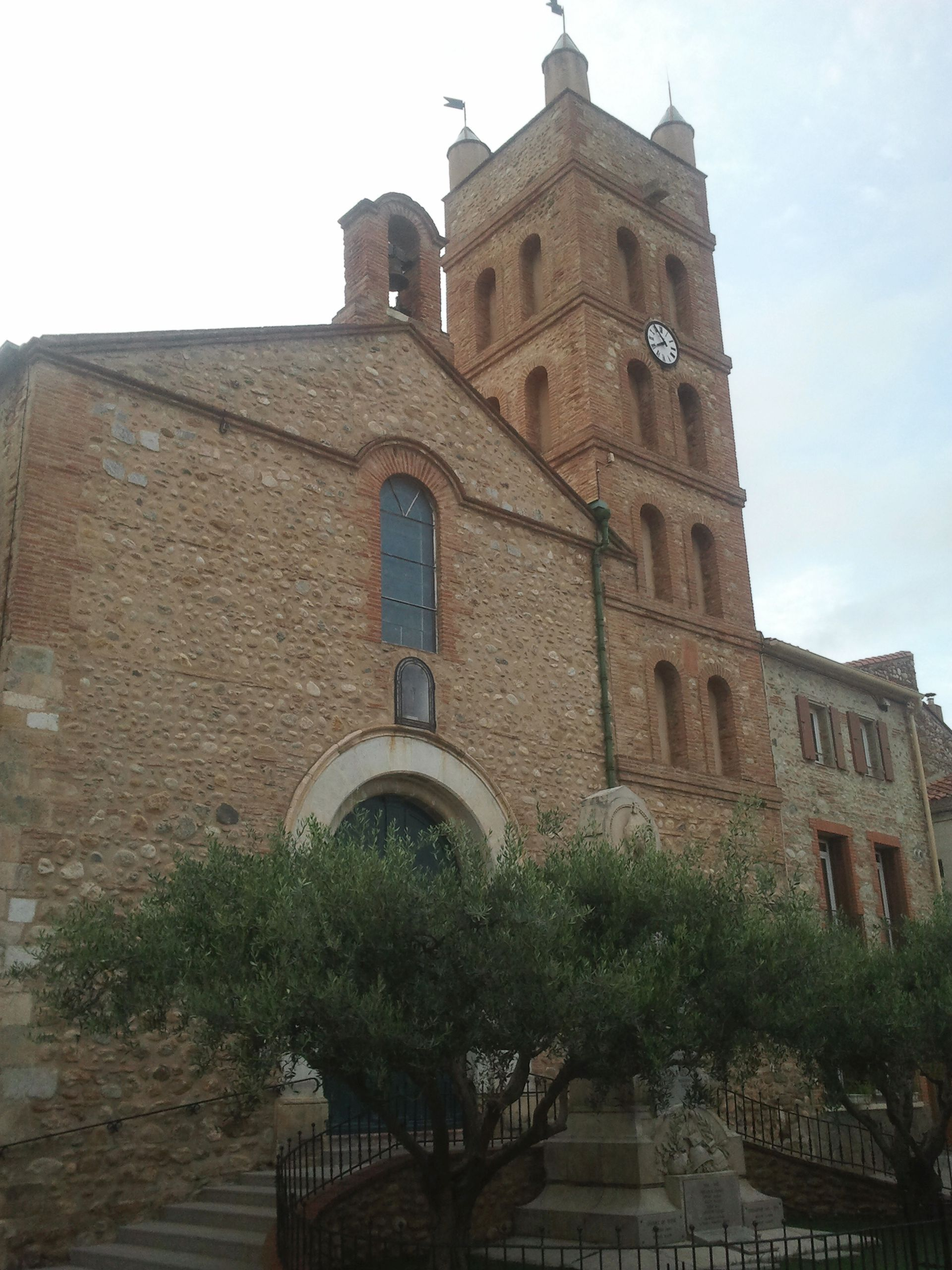 Eglise et monument aux morts de Corneilla-la-Rivière